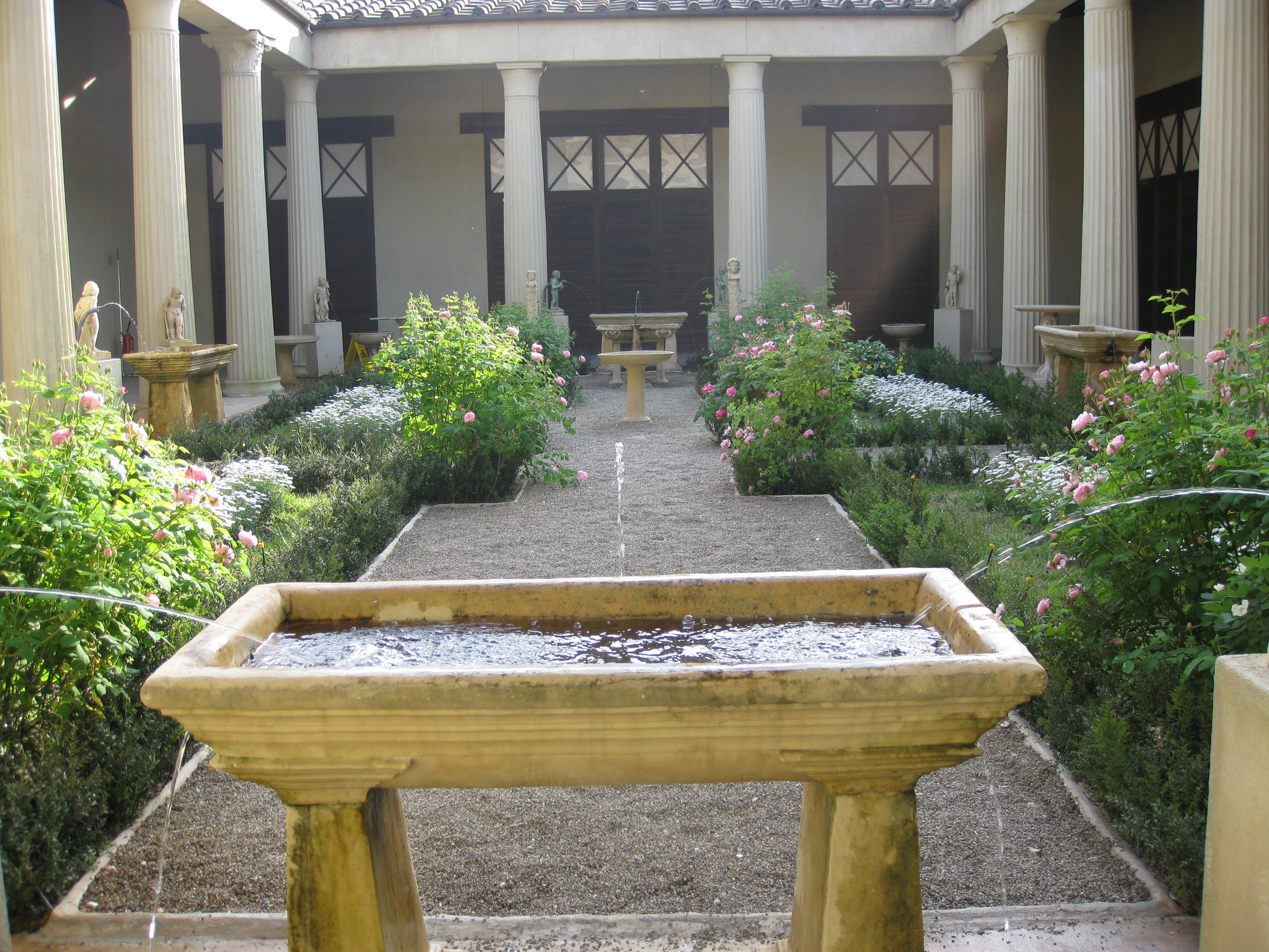 Boboli Gardens גני בובולי